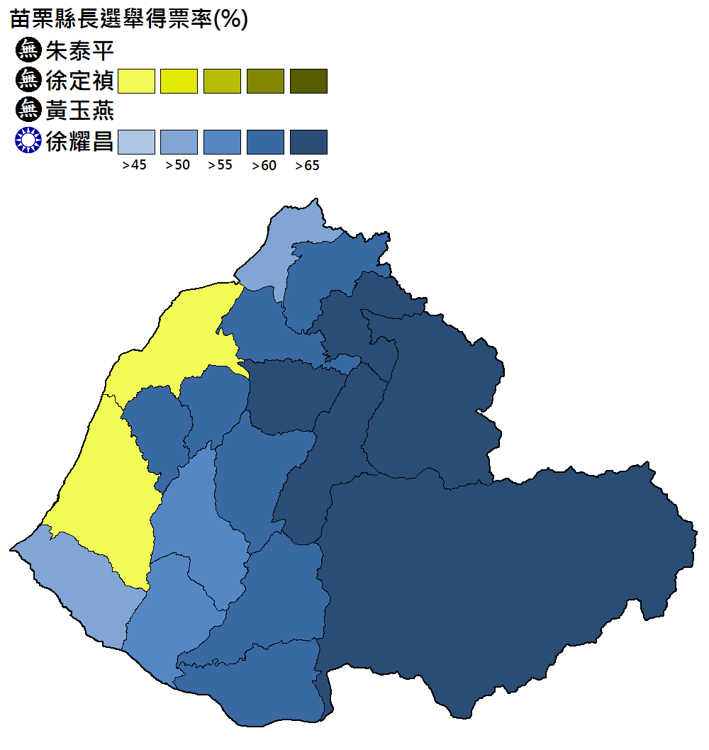 苗栗縣長選舉得票分布。